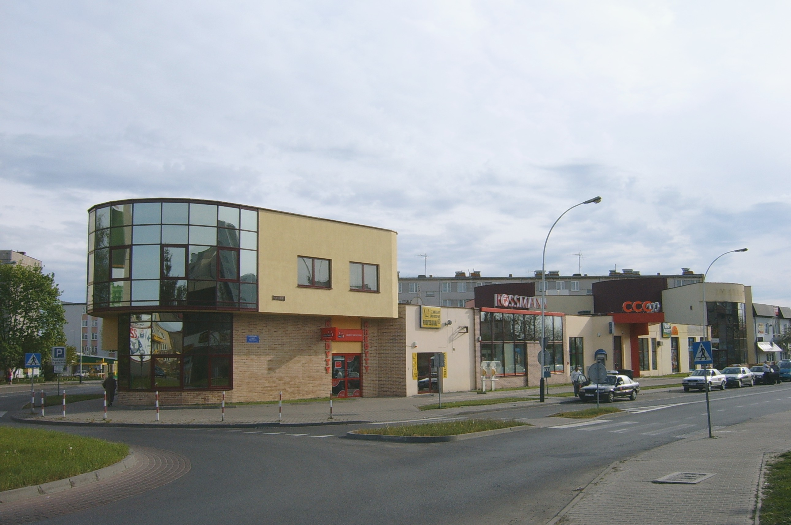 Dom handlowy "Tomasz" w Zamościu